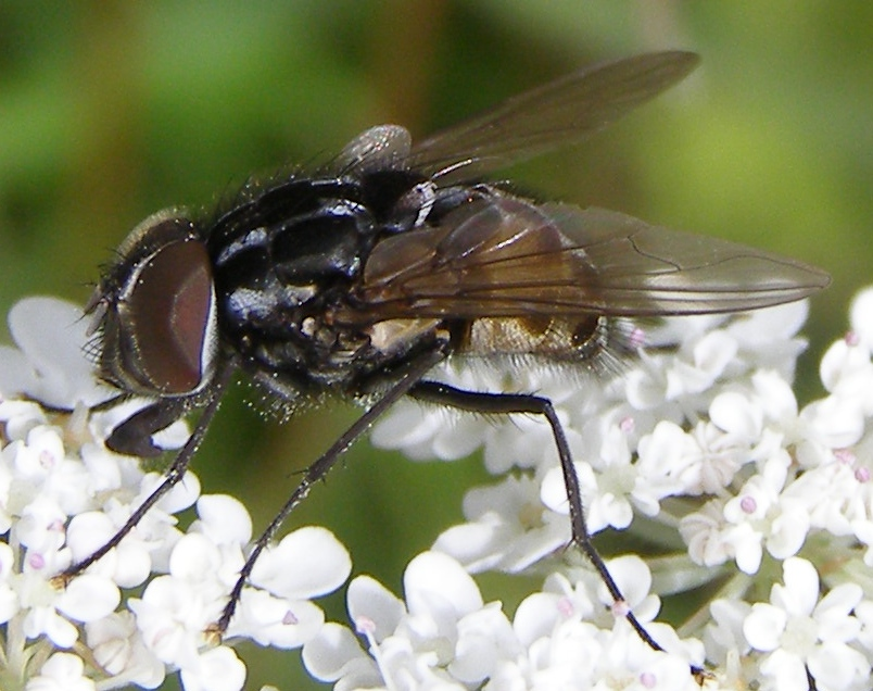 A male Graphomya maculata.